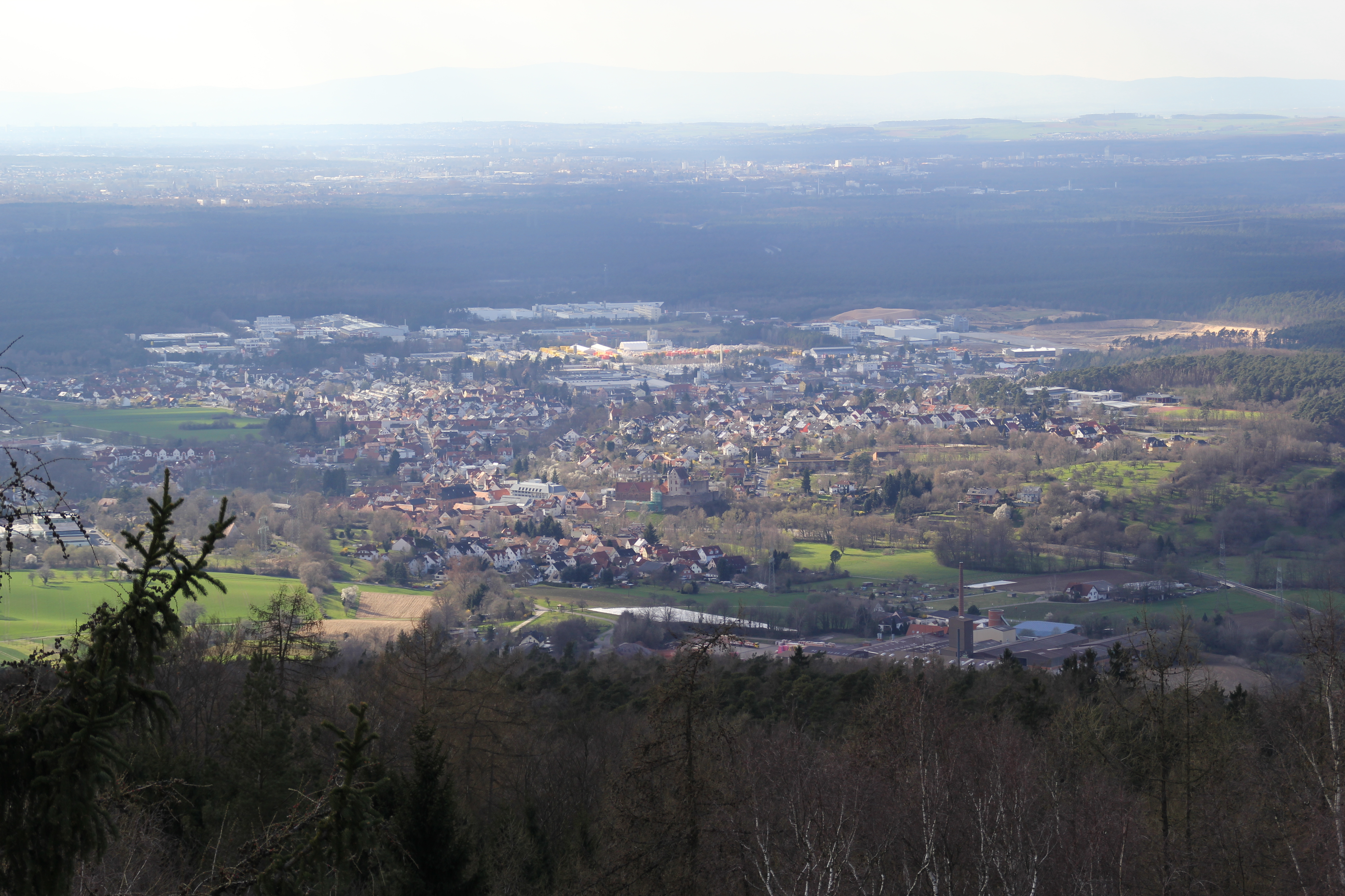 Alzenau im Landkreis Aschaffenburg, Bayern. Gesehen vom Ludwigsturm auf dem Hahnenkamm.